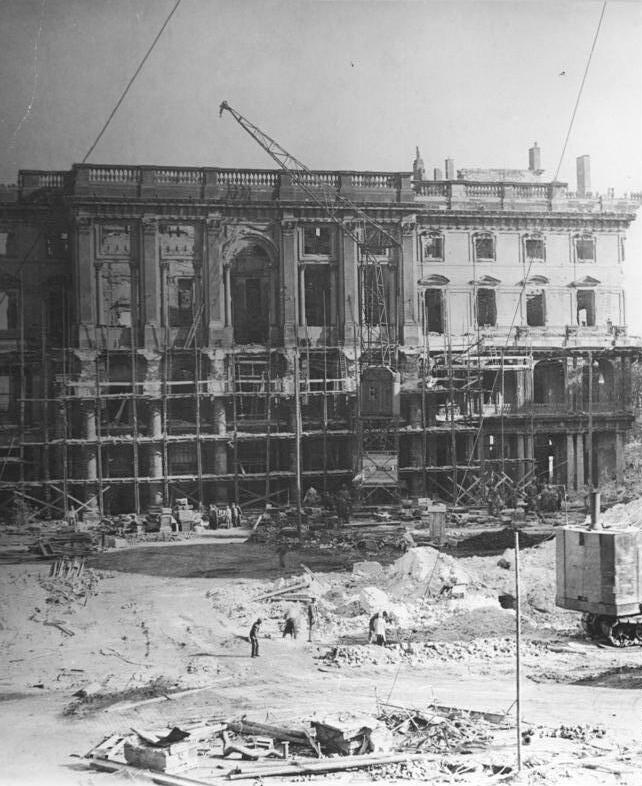 Illus-Kemlein-Igel Kno-Leu. 21.11.50 Der Abriss des Berliner Schlosses. Die Arbeiten zur Beseitigung der Schlossruine in Berlin scheiten ständig fort. Wertvolle Ornamente werden vor dem Abriss oft unter grössten Schwierigkeiten ausgebaut. UBz: Zum Abräumen der Schuttmassen sind Krände und Bagger eingesetzt.